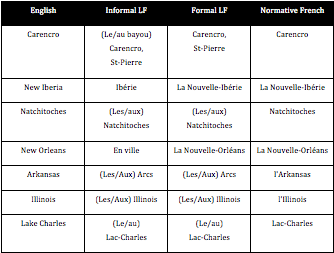 Place names with names or usage different in Louisiana French from normative French.